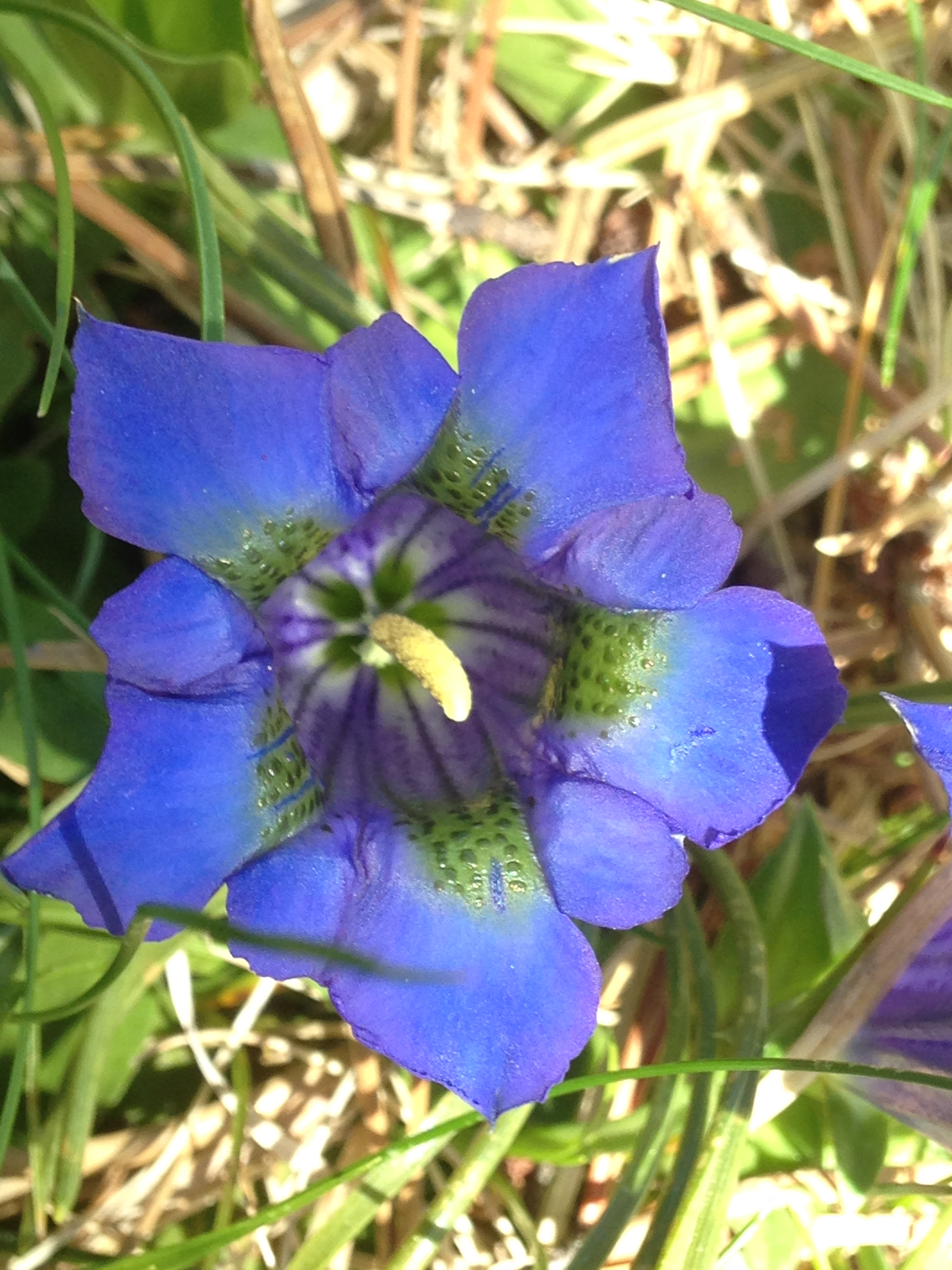 Tossa Plana de Lles-Puigpedrós This is a a photo of a natural area in Catalonia, Spain, with id: ES510205